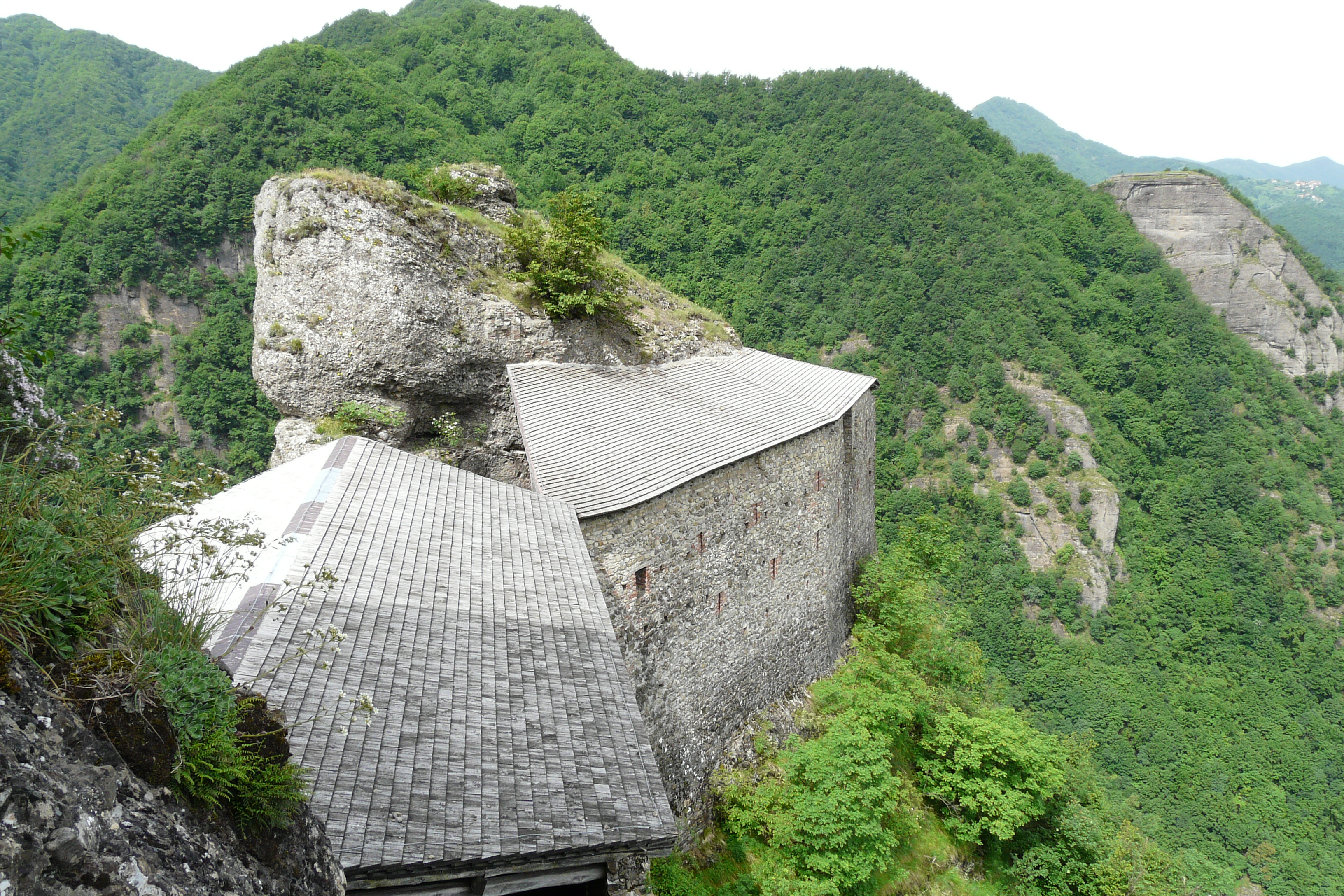 Serie di immagini interne ed esterne del Castello della Pietra di Vobbia, Liguria, Italia